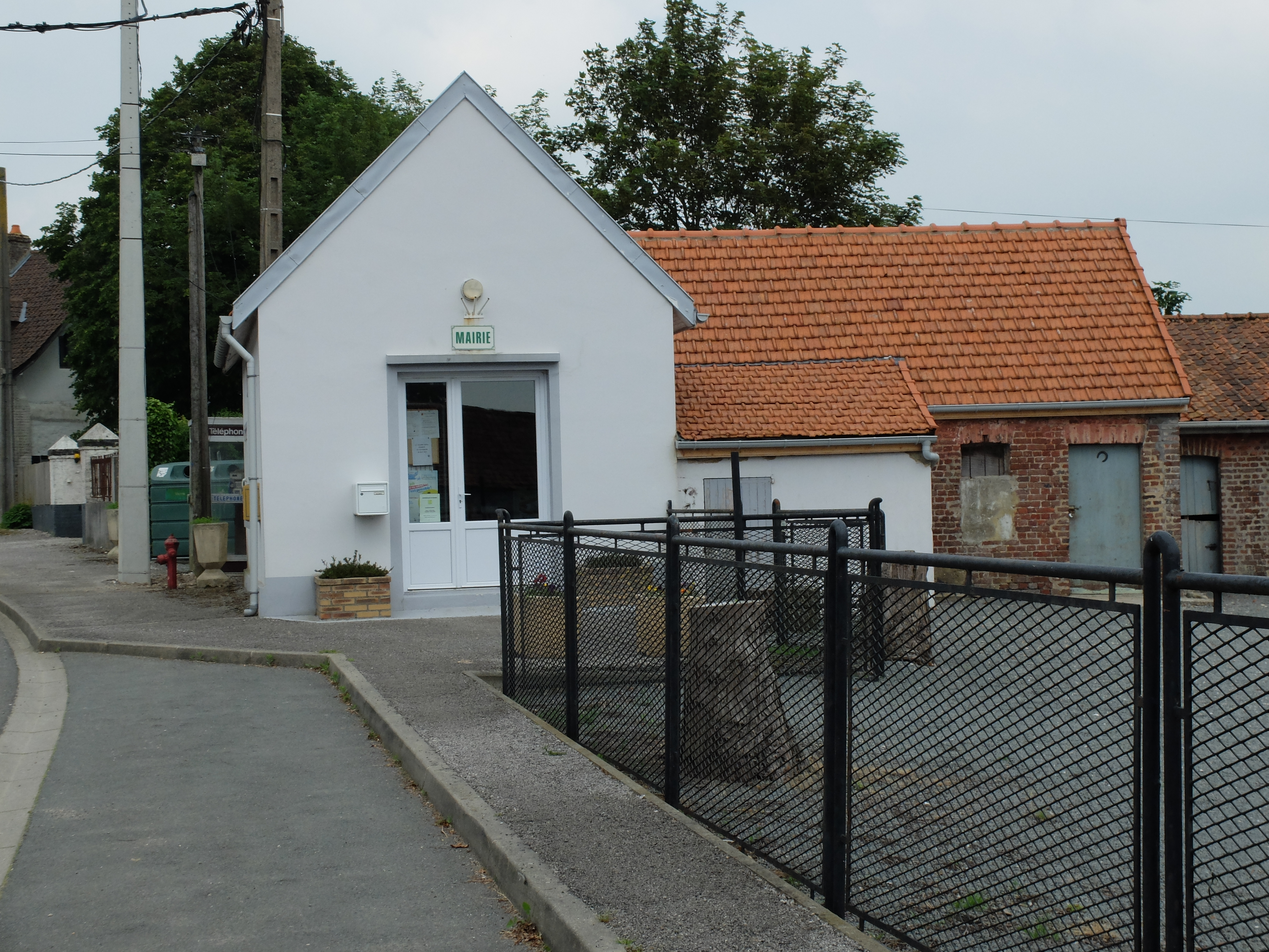 Vue de la mairie de Campigneulles-les-Grandes.